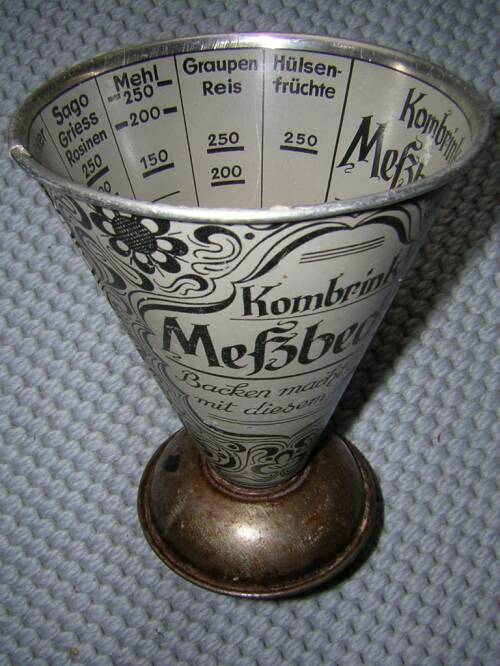 Messbecher